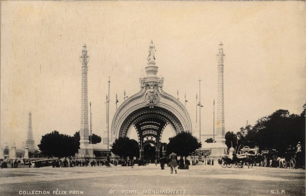 René Binet (1866-1911) / Porte Monumentale / 1900 / photo argentique / 11,6x7,6cm / photo extraite du catalogue souvenir de l'Exposition Universelle 1900, Paris, collection particulière (exemplaire illustré : Paris, coll. particulière [R.S.])